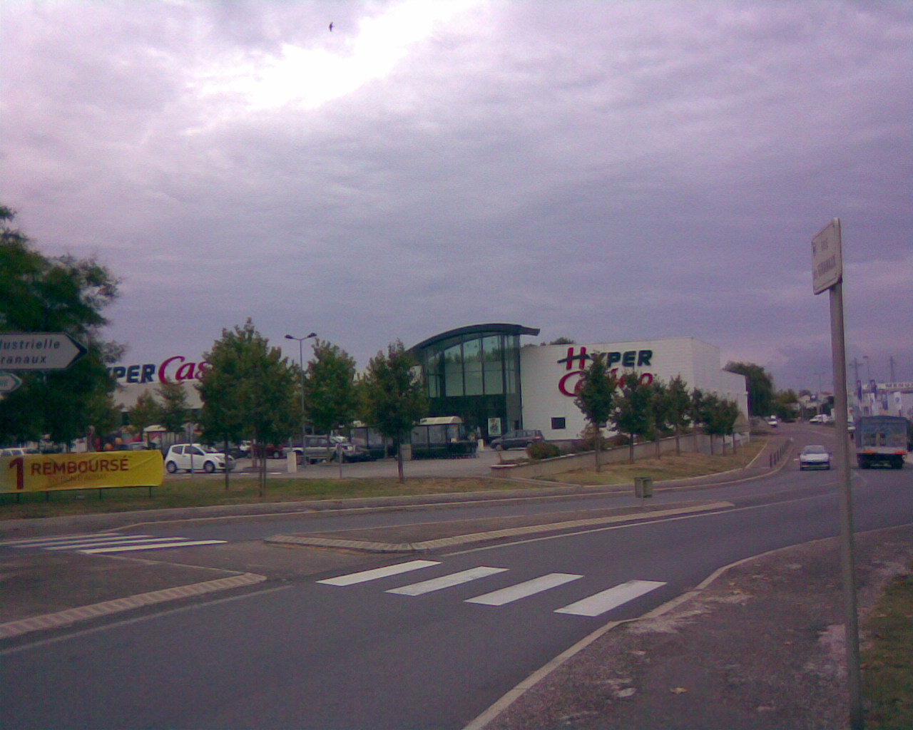 Hyper Casino zone industrielle "Les giranaux" à Gray (Arc-lès)